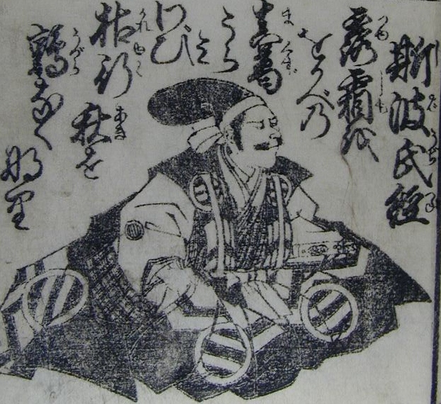 shibaujitzune